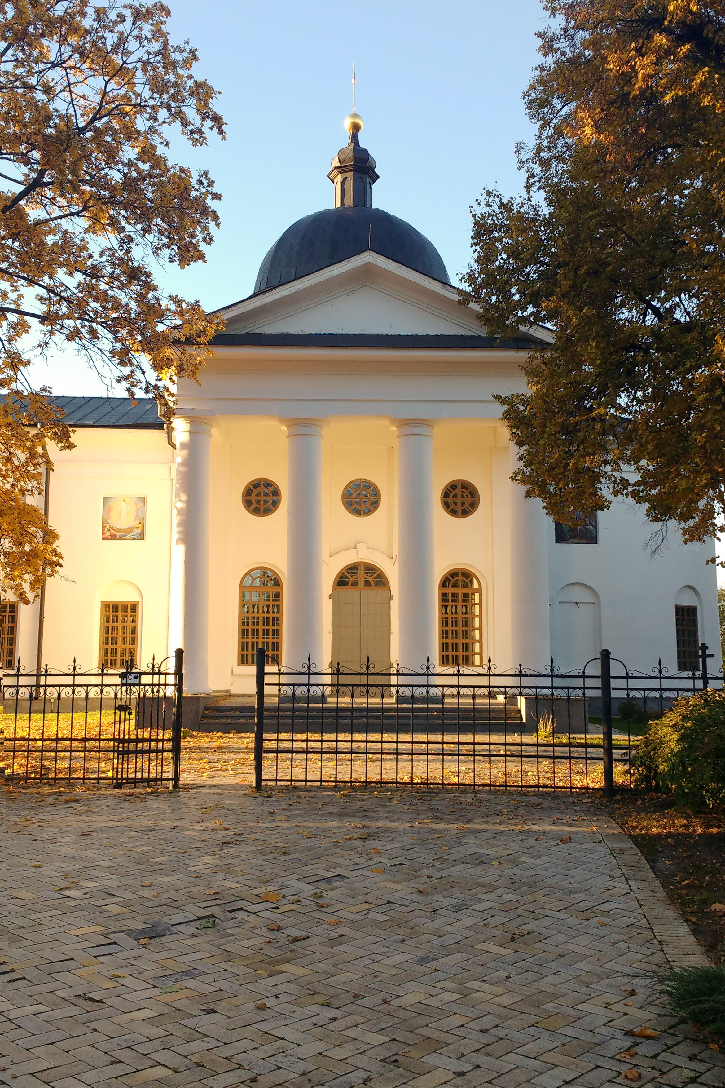 Воскресенська церква – усипальниця К.Г. Розумовського (мур.), Батурин, пров. Центральний, 22